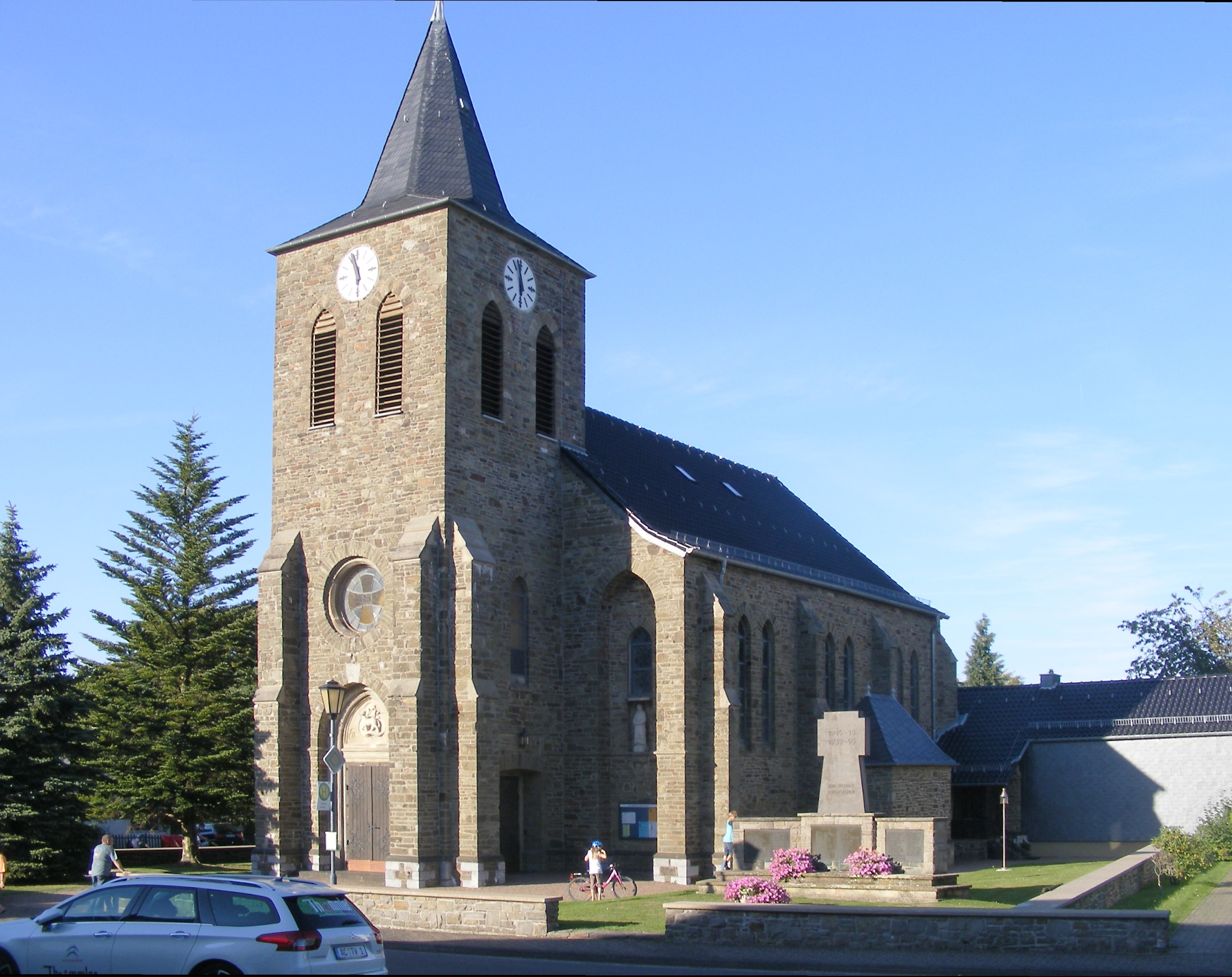 Simmerath Steckenborn KircheThis is a photograph of an architectural monument., no. 70